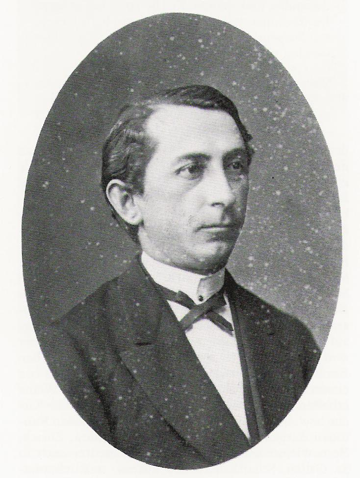 Bischof Eduard Herzog (1841-1921), ungefähr 35jährig